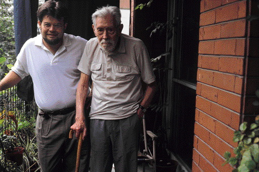 Liborio Justo en su casa (sobre la calle Moldes, de Buenos Aires) con Claudio Bertonatti en ocasión de uno de los encuentros en 1999 (Foto: Archivo Bertonatti).